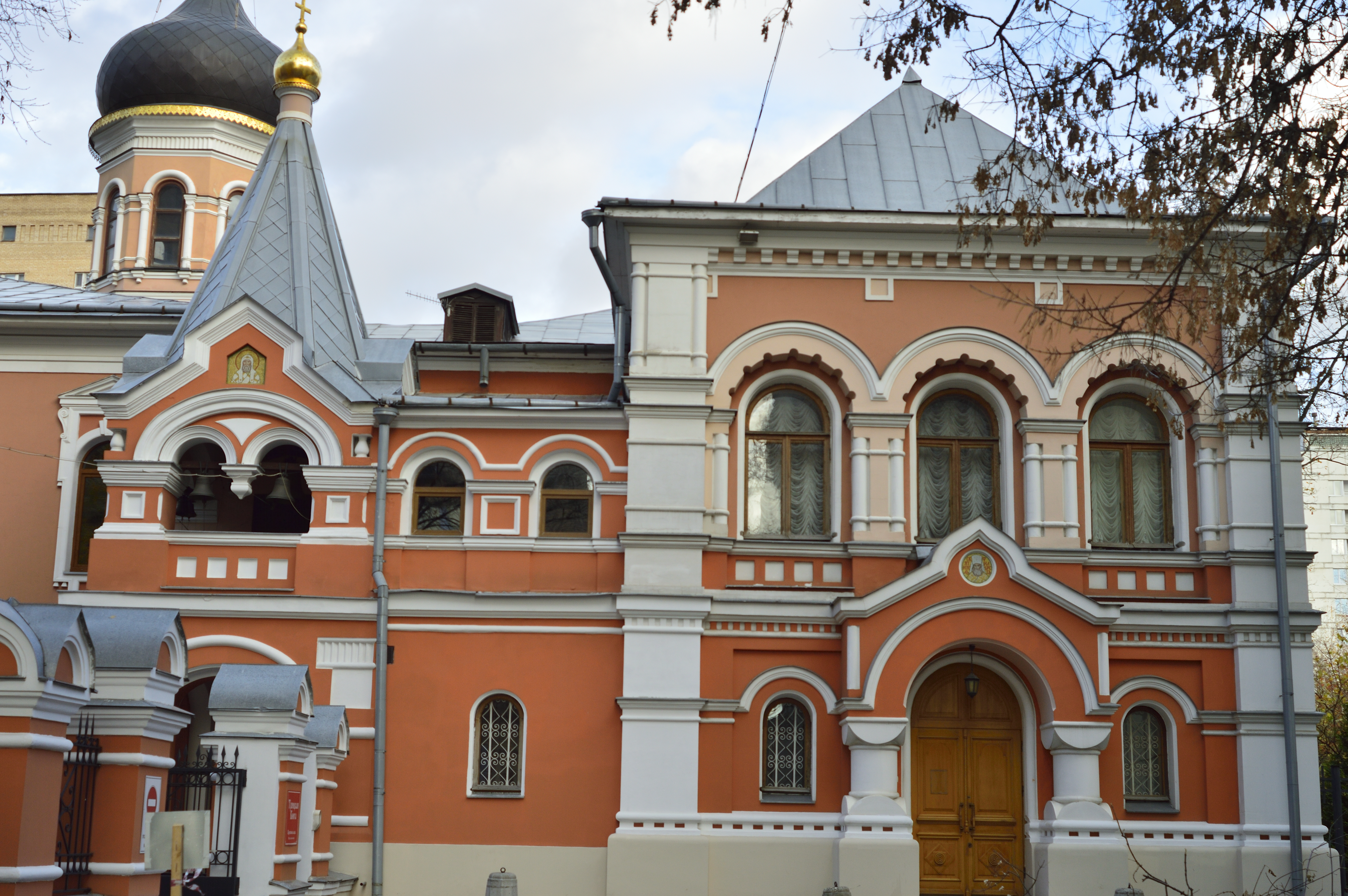 Митрополичьи покои (Подворье Троицкой Сергиевой Лавры в Москве (Троицкое подворье). Западная сторона)